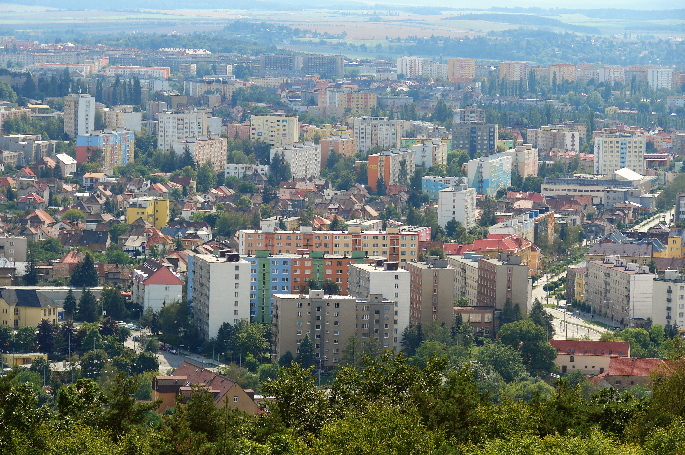 Doubravka